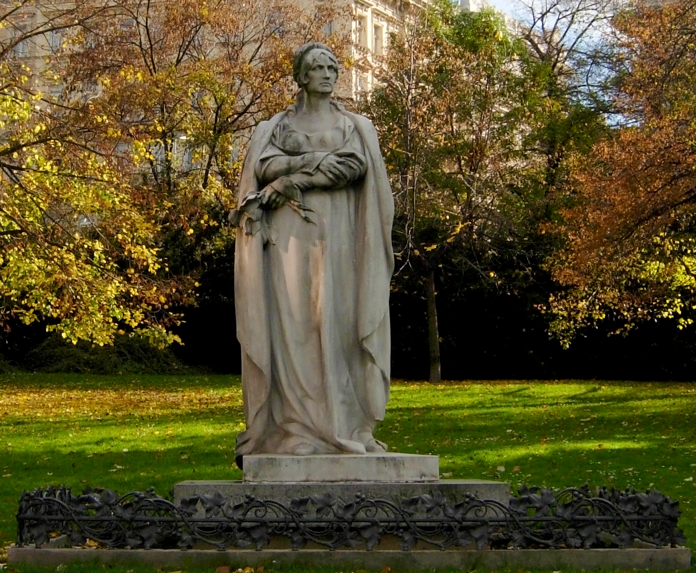 Pomník Otýlie Sklenářové-Malé, Praha 1, Čelakovského sady, Nové Město.